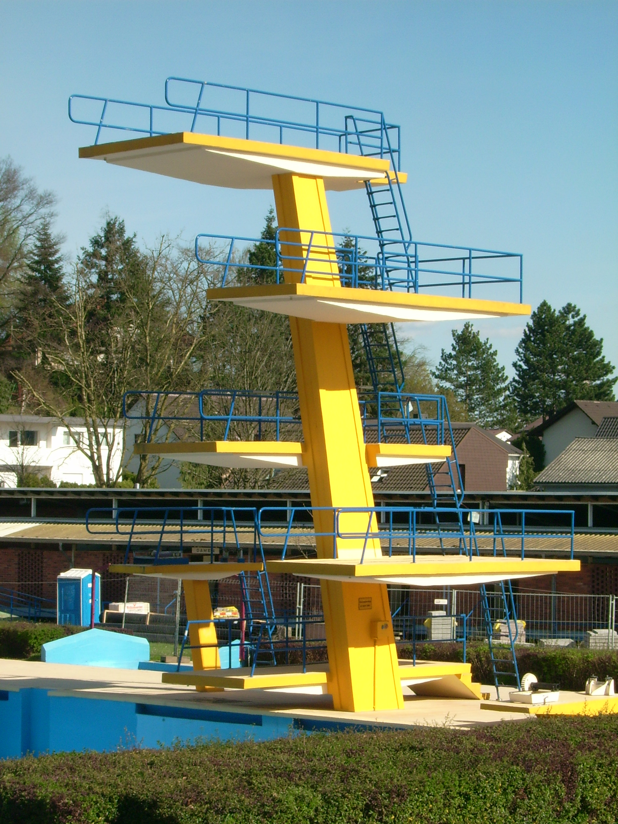 Sprungturm im Freibad Dillingen/Saar